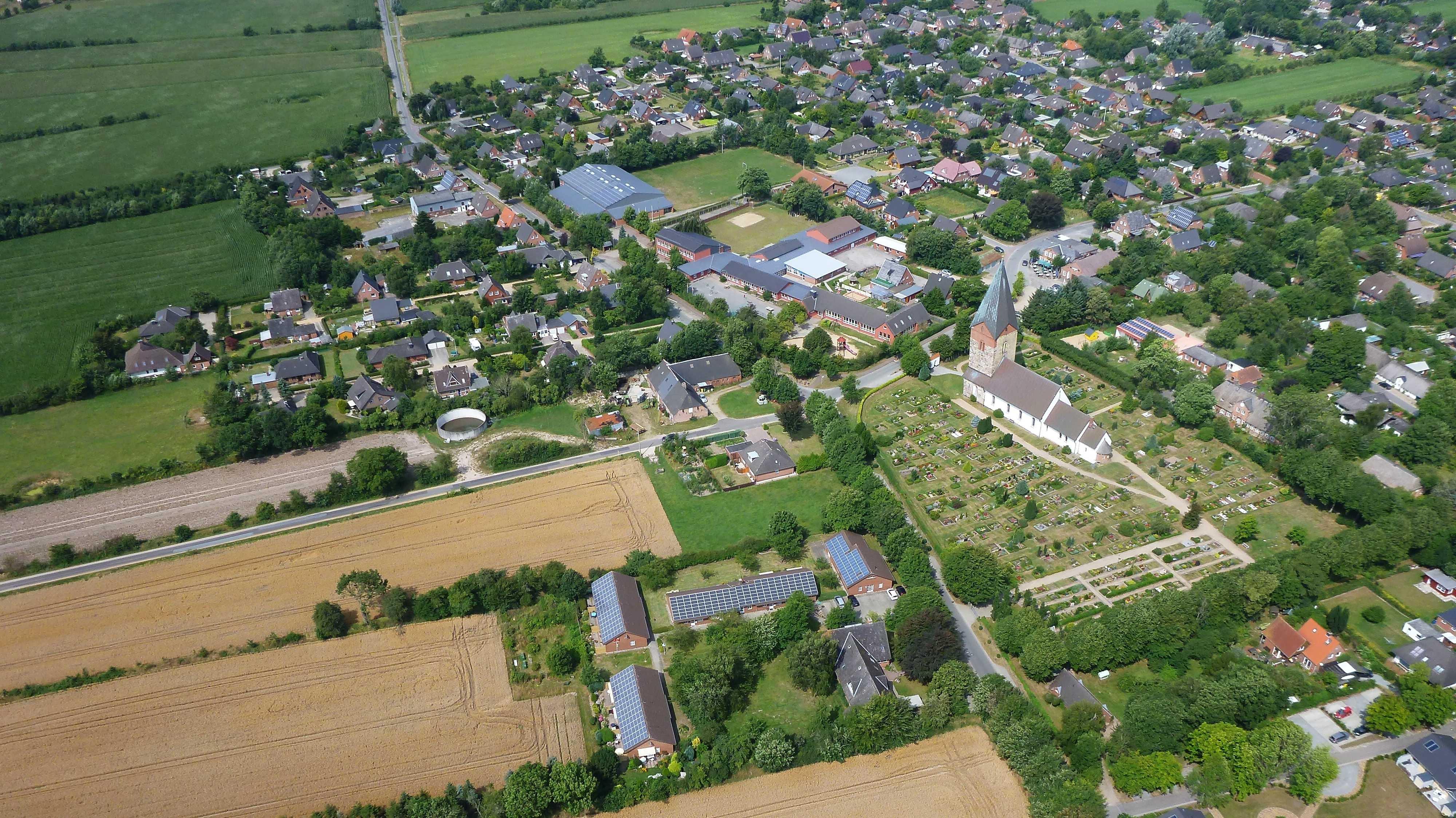 View of Hattstedt in Nordfriesland, Schleswig-Holstein, August 2014